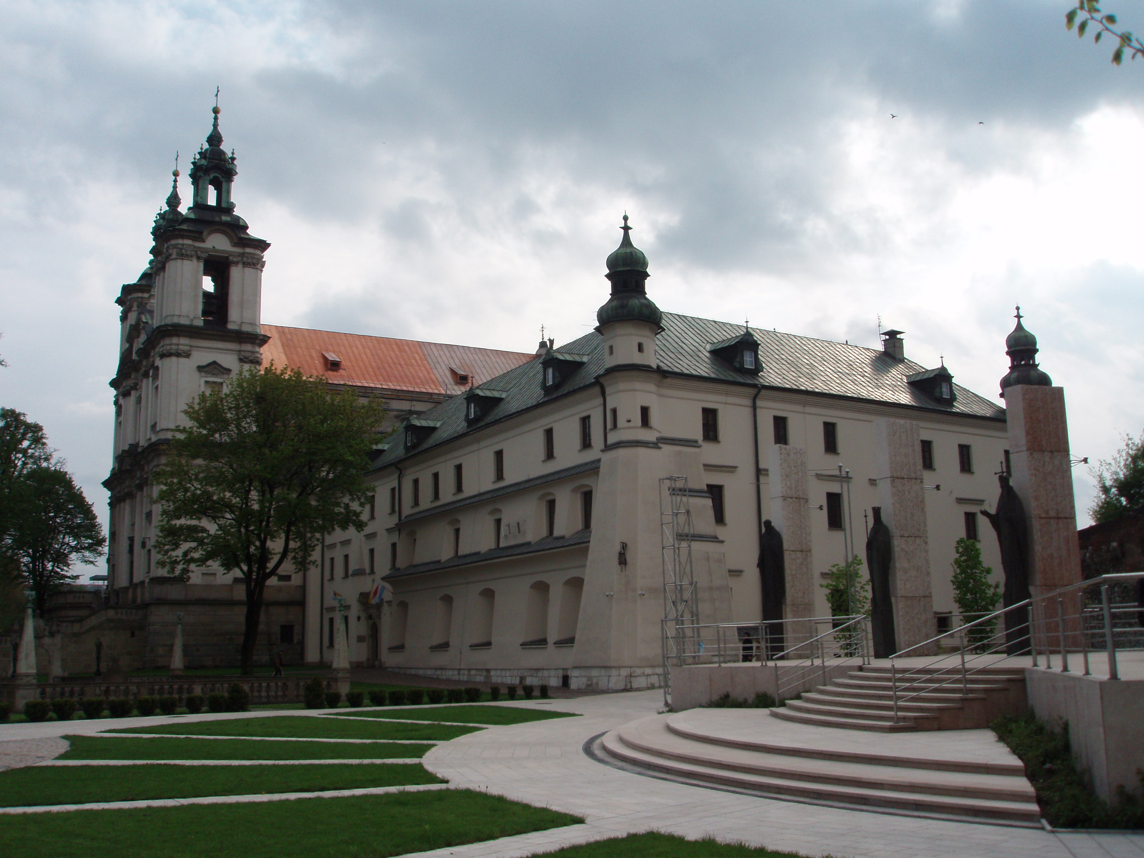 Kościół Na Skałce